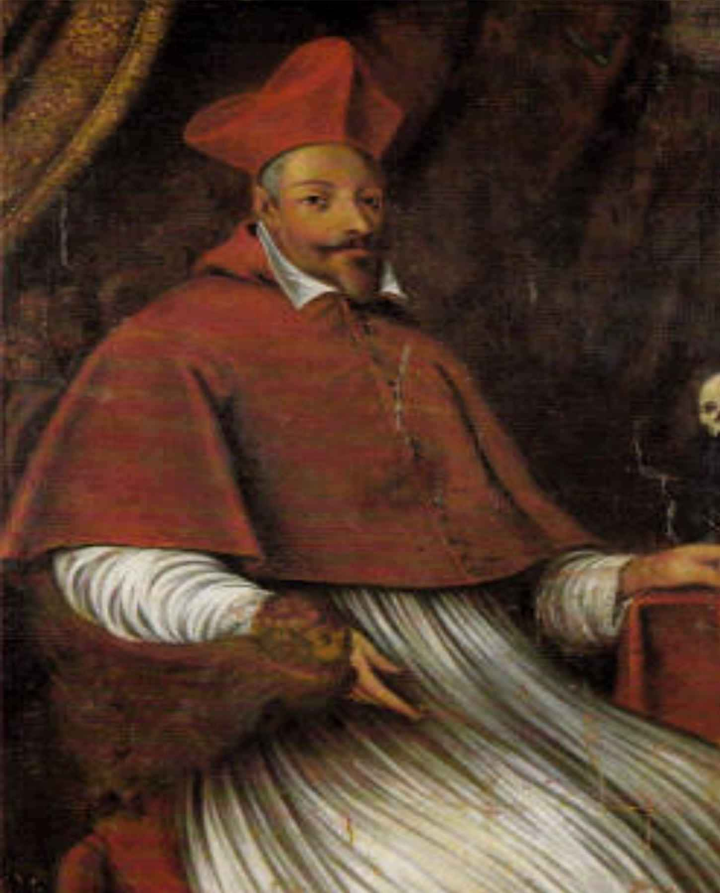 Kardinal Carlo Madruzzo (1562-1629)